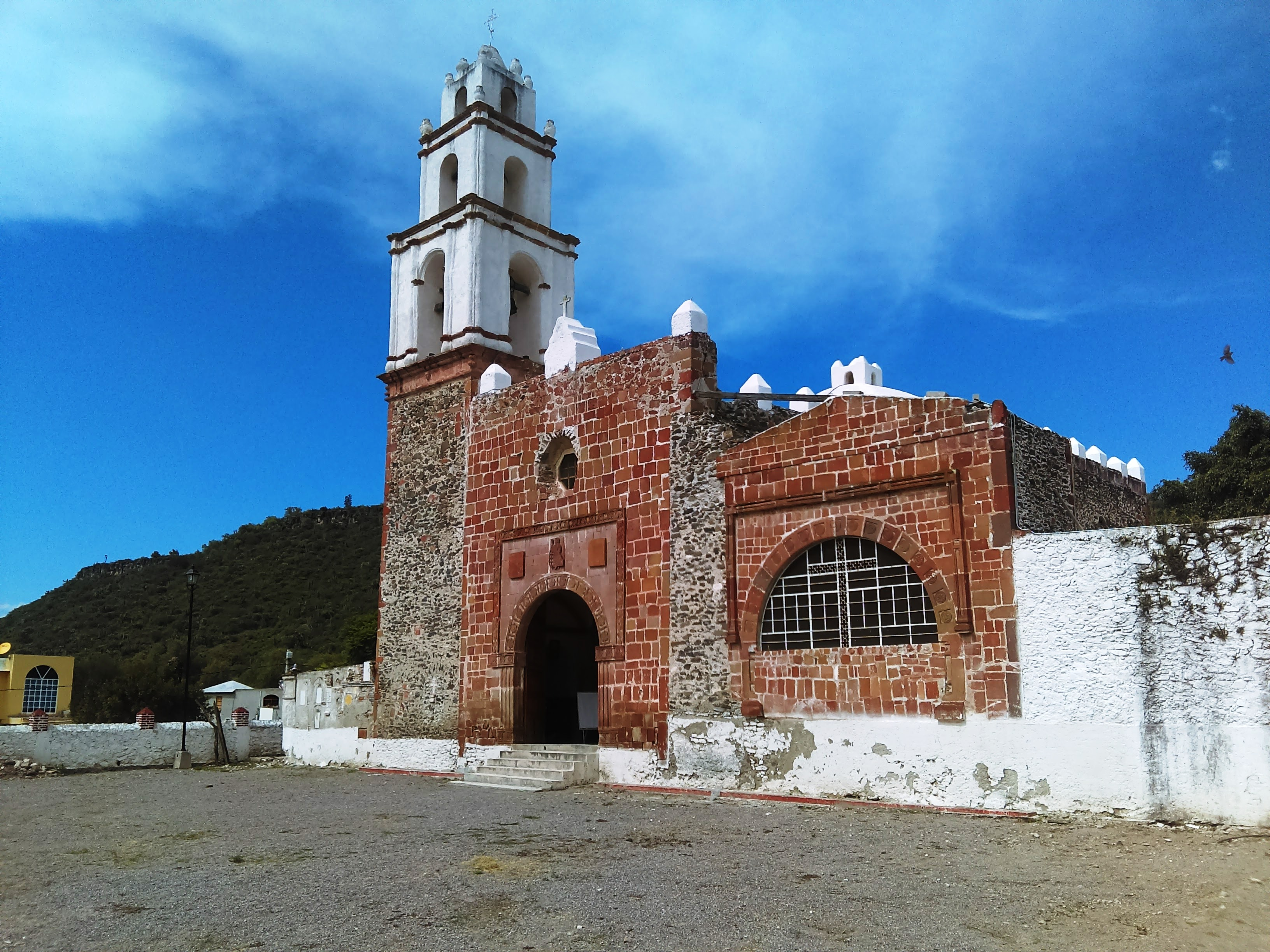 Iglesia de San Lorenzo Mártir en Tlacotlapilco, Hidalgo